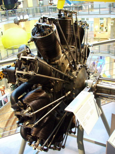 Siemens-Halske Sh.III at Technisches Museum Wien